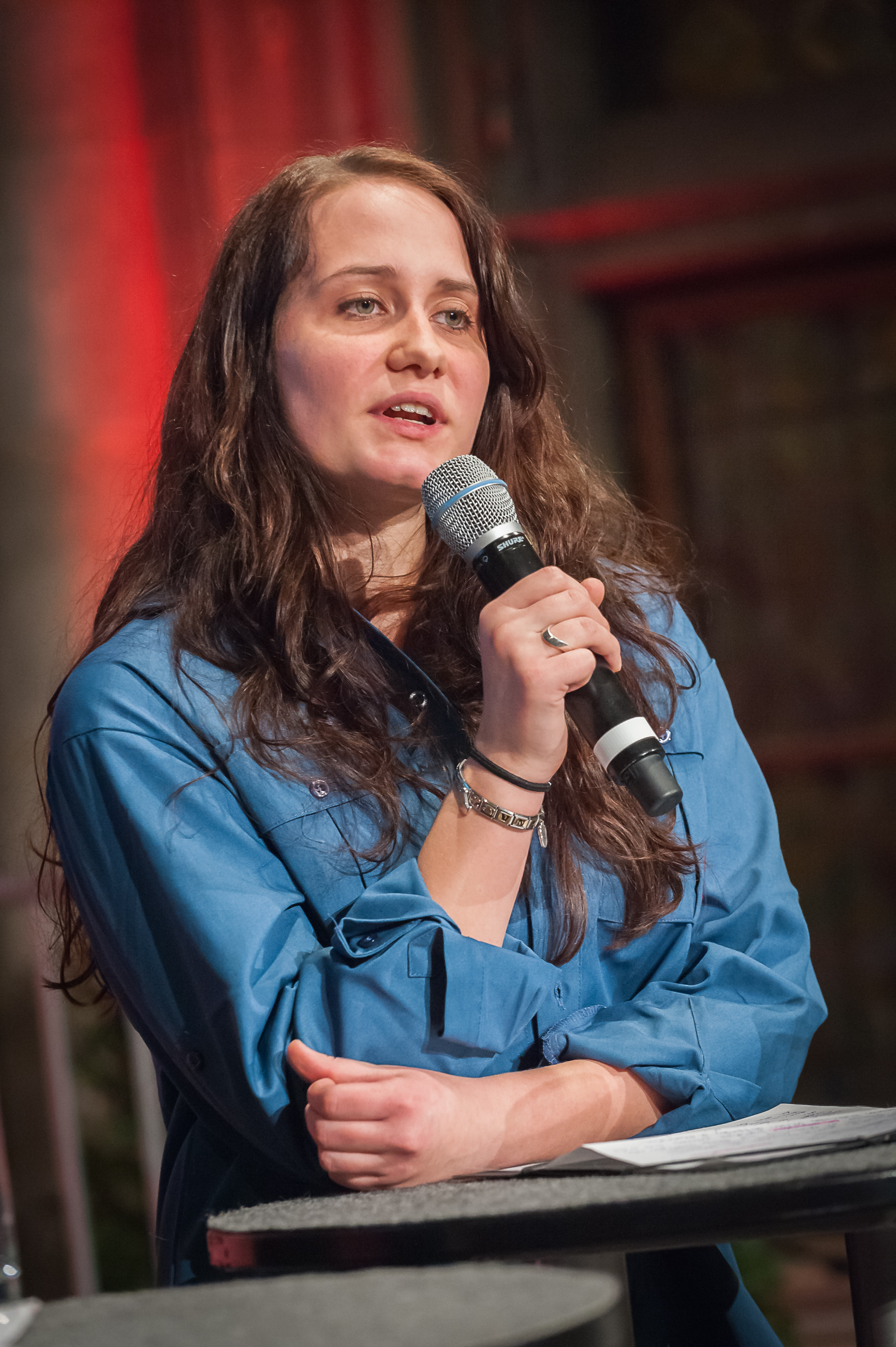 Wien, 12.2.2014 Foto: Thomas Lehmann Gedenkveranstaltung: 80 Jahre 12. Februar 1934